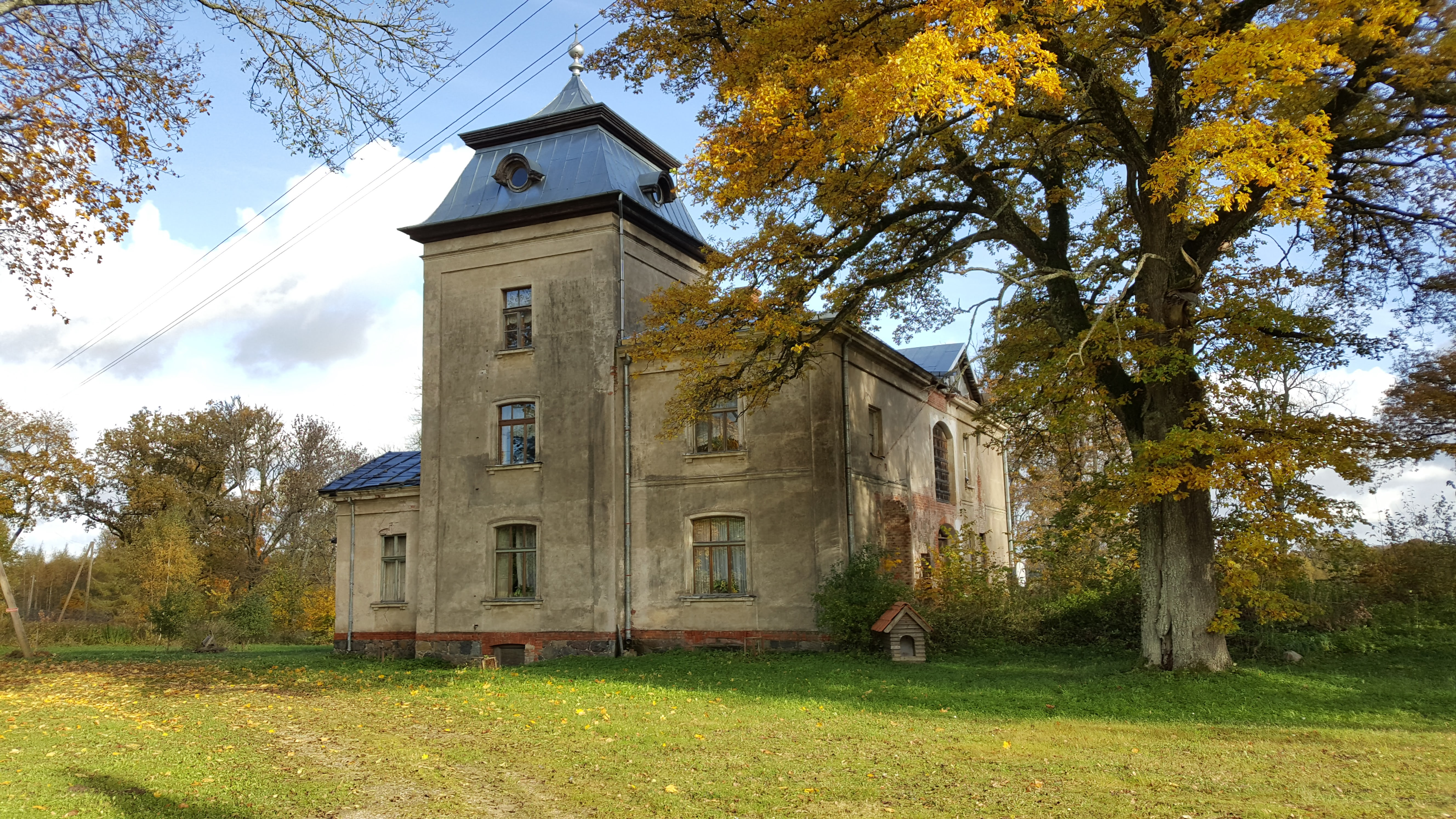 Veismaņi mõisa peahoone 2017. aastal.